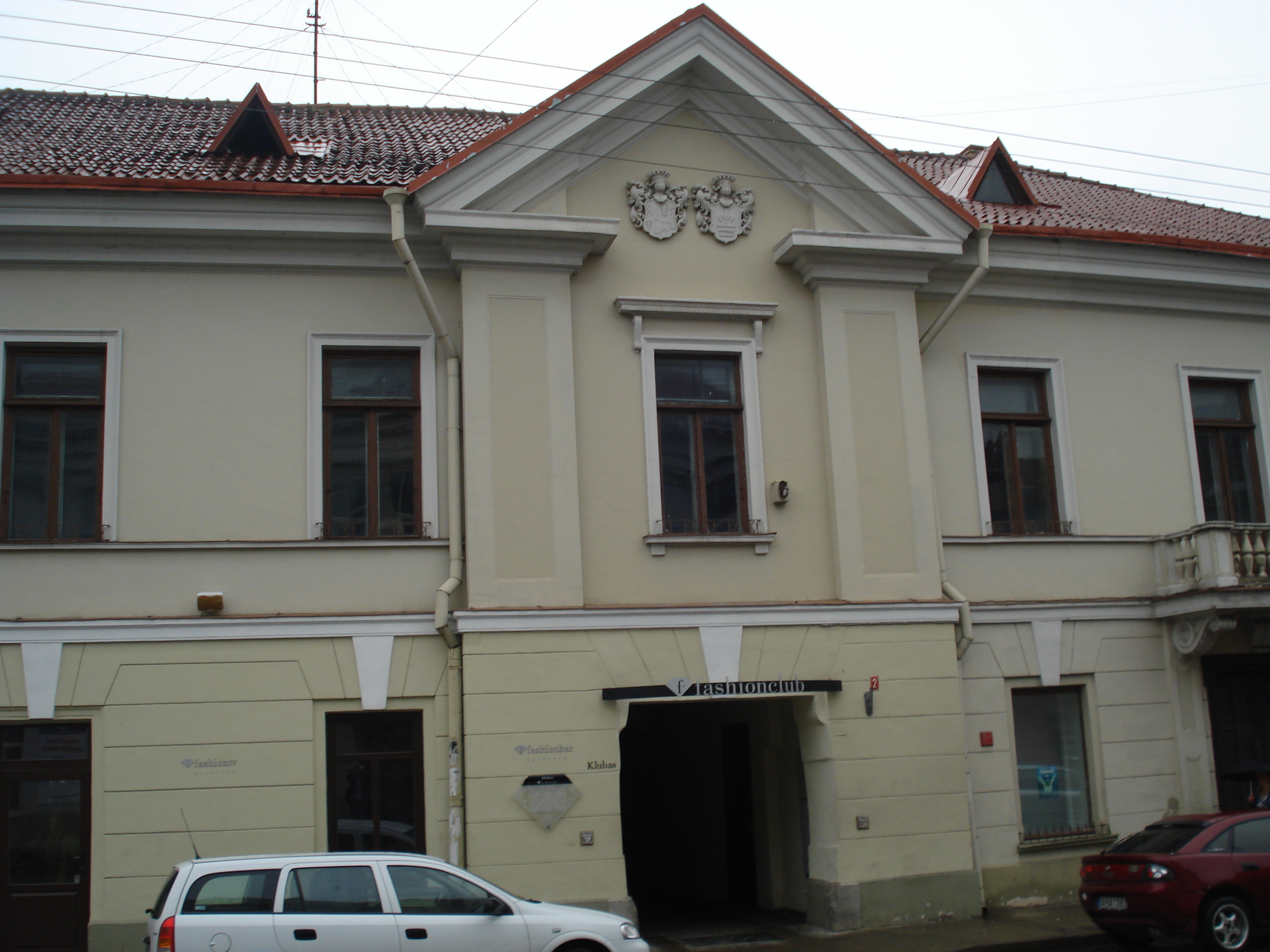 Дворец Умястовских в Вильнюсе. Траку 2